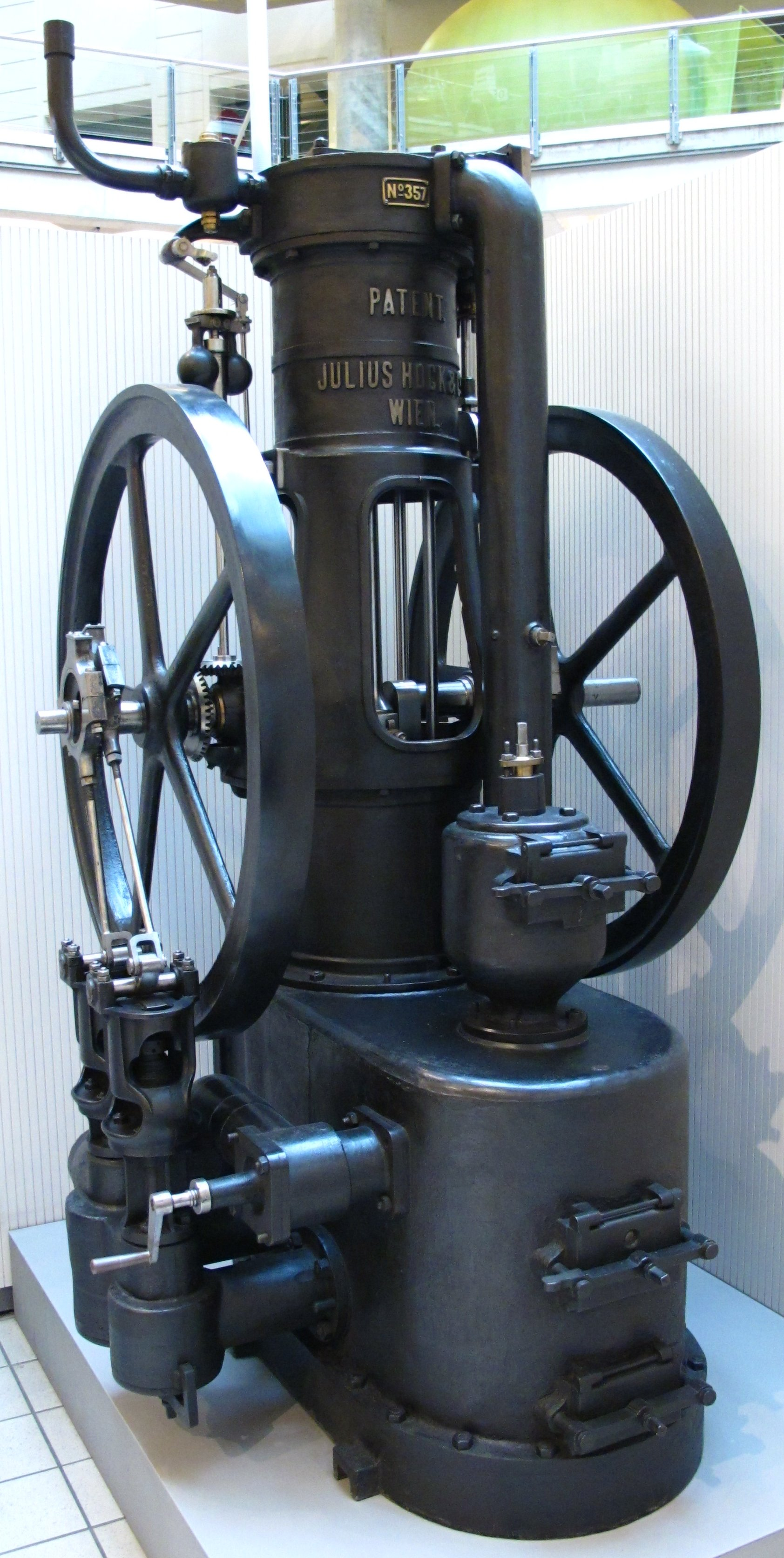 1807 wird die „Feuerluftmaschine“ von George Cayley der Öffentlichkeit vorgestellt. Solche Heißluftmotoren sind zunächst ein großer Erfolg und werden für den Antrieb von Pumpen, Pressen und Sägen genutzt. Gegen Ende des 19. Jahrhunderts werden sie durch Benzin-, Diesel und Elektromotoren verdrängt. Konstruktuer: Julius Hock Baujahr: 1878